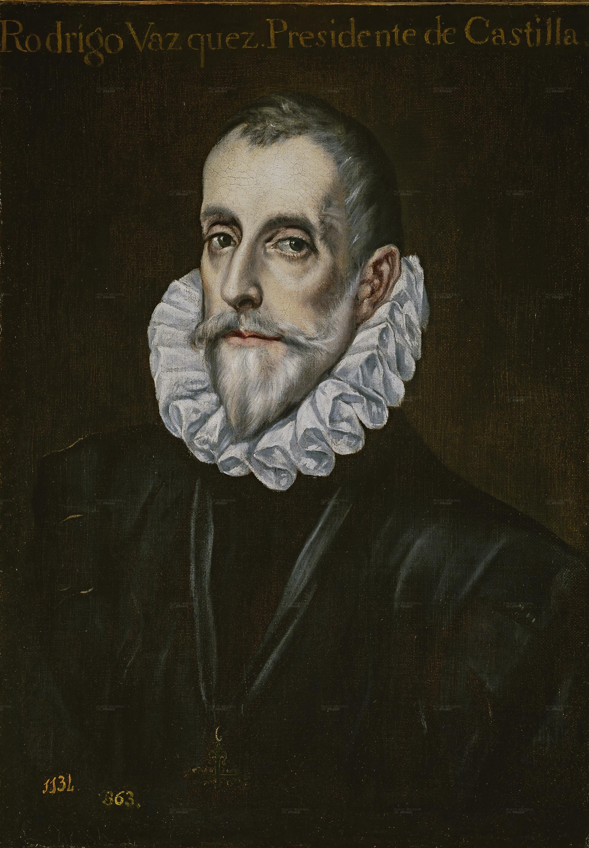 Retrato del político y diplomático español Rodrigo Vázquez de Arce († 1599), que llegó a ser presidente de los Consejos de Castilla y de Hacienda y embajador en Portugal. Esta obra es una copia anónima de un retrato pintado por El Greco.